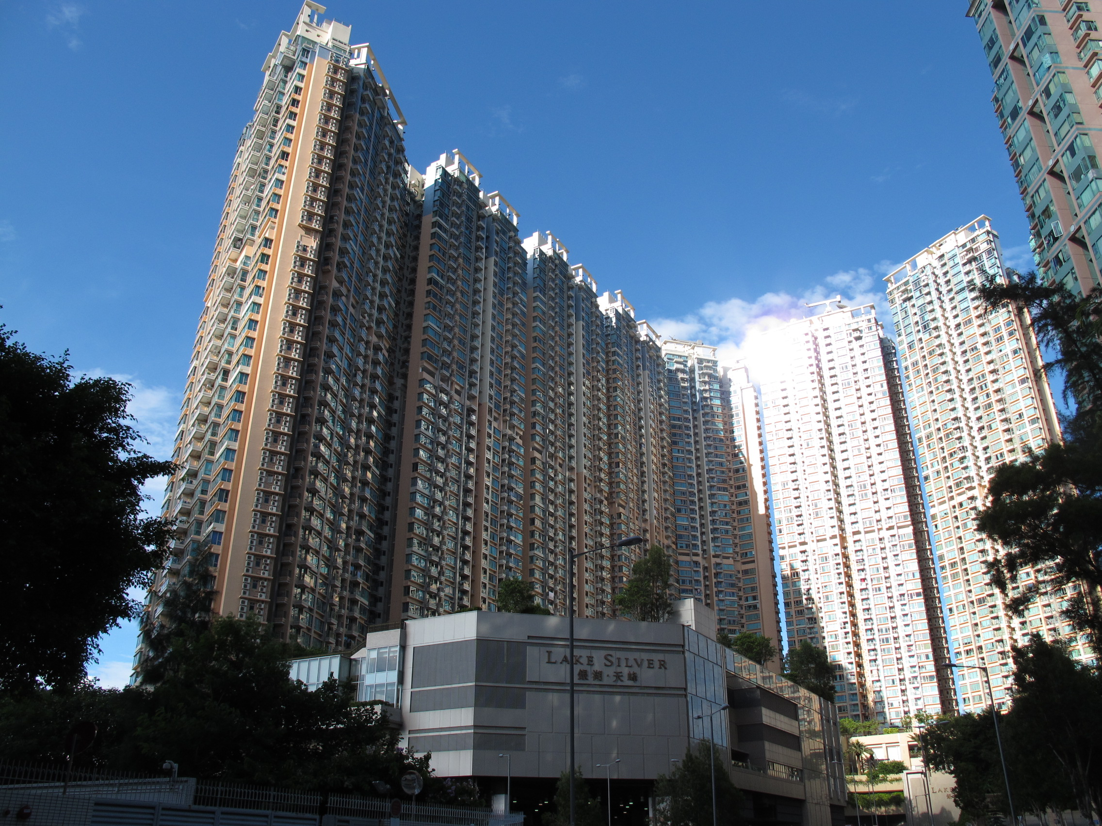 HK Lake Silver 銀湖·天峰